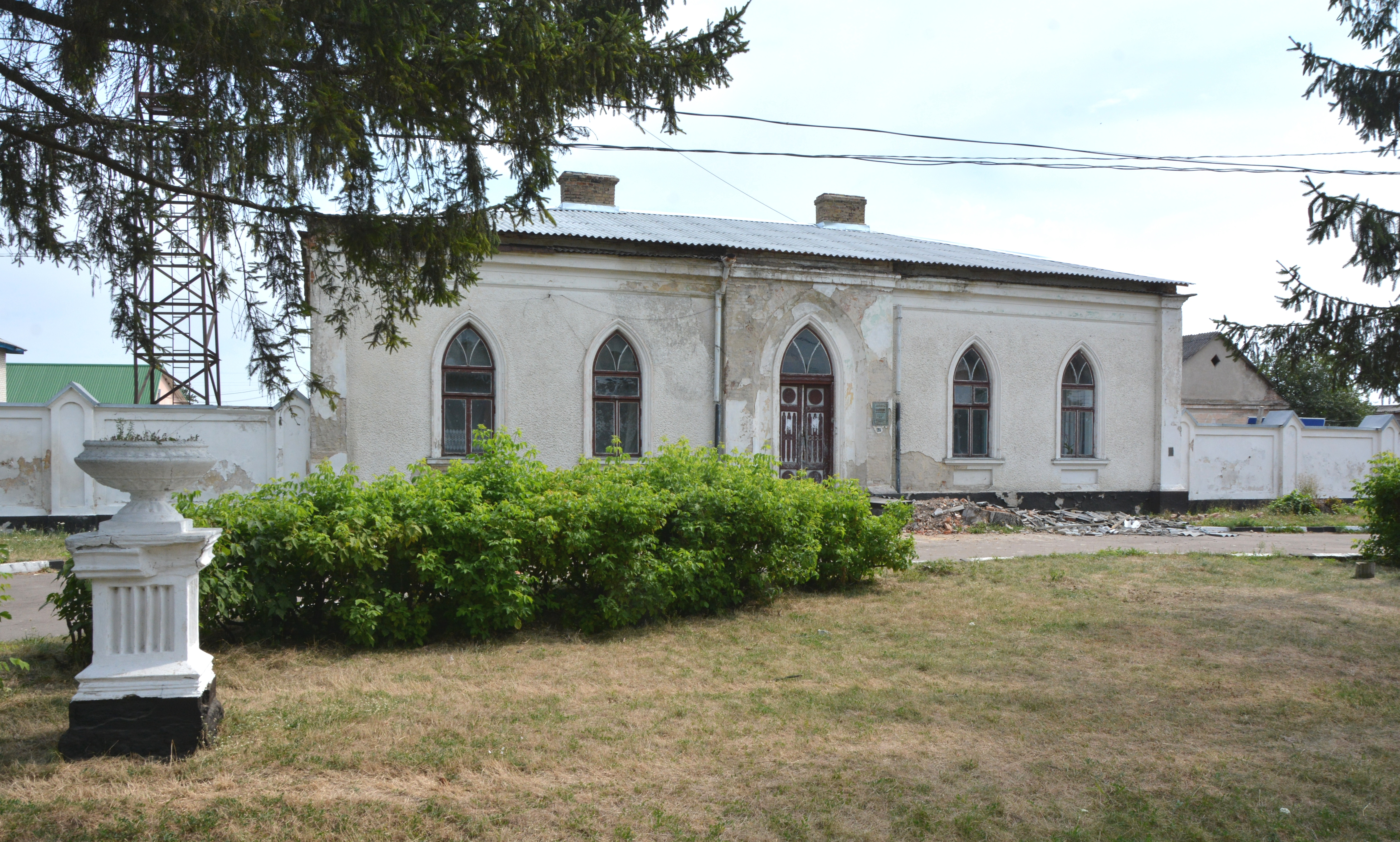 Поштова станція (мур.), Копачівка